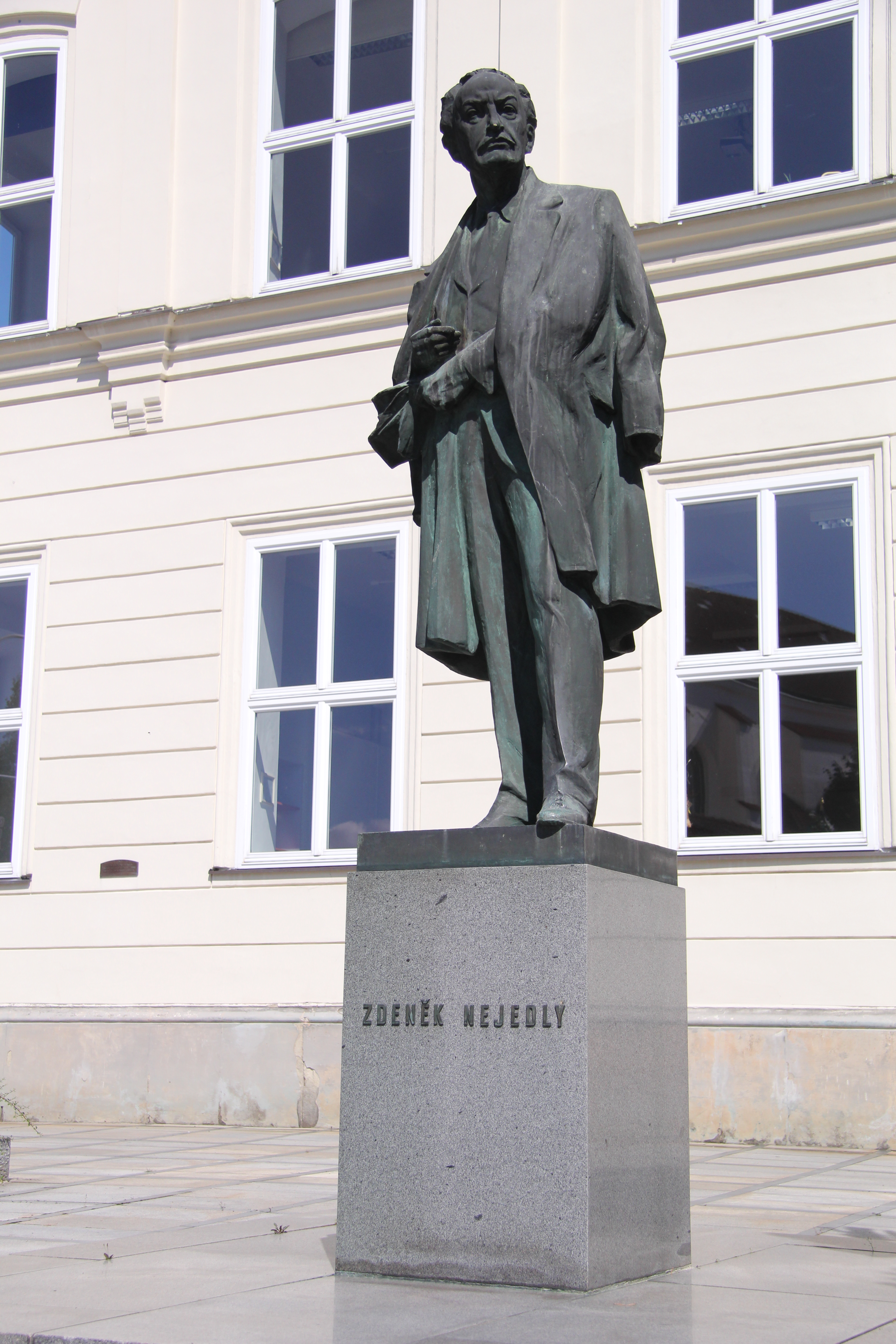 Socha Zdeňka Nejedlého od Jana Hány u 1. základní školy v Litomyšli z roku 1978